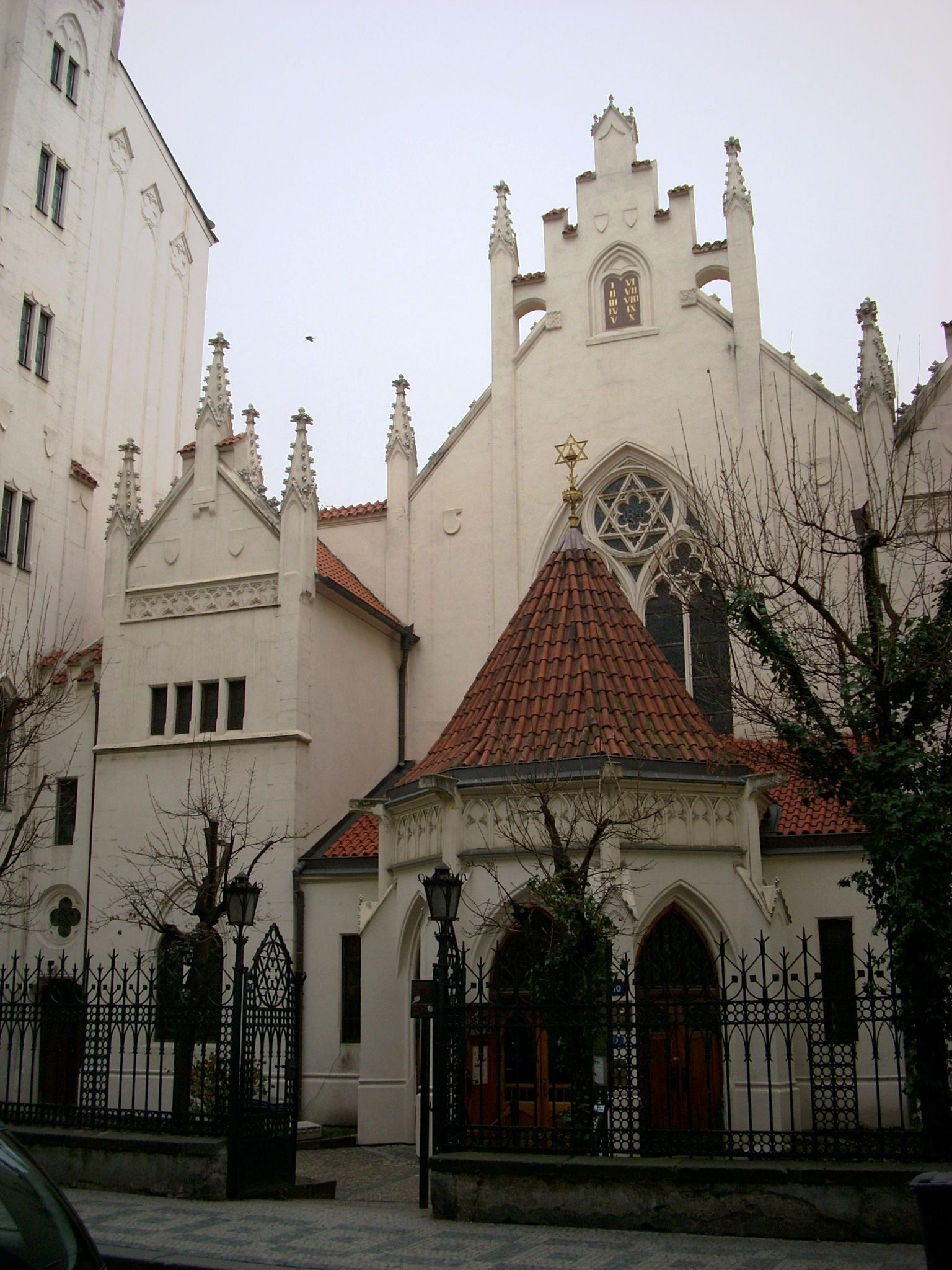 Maiselova synagoga